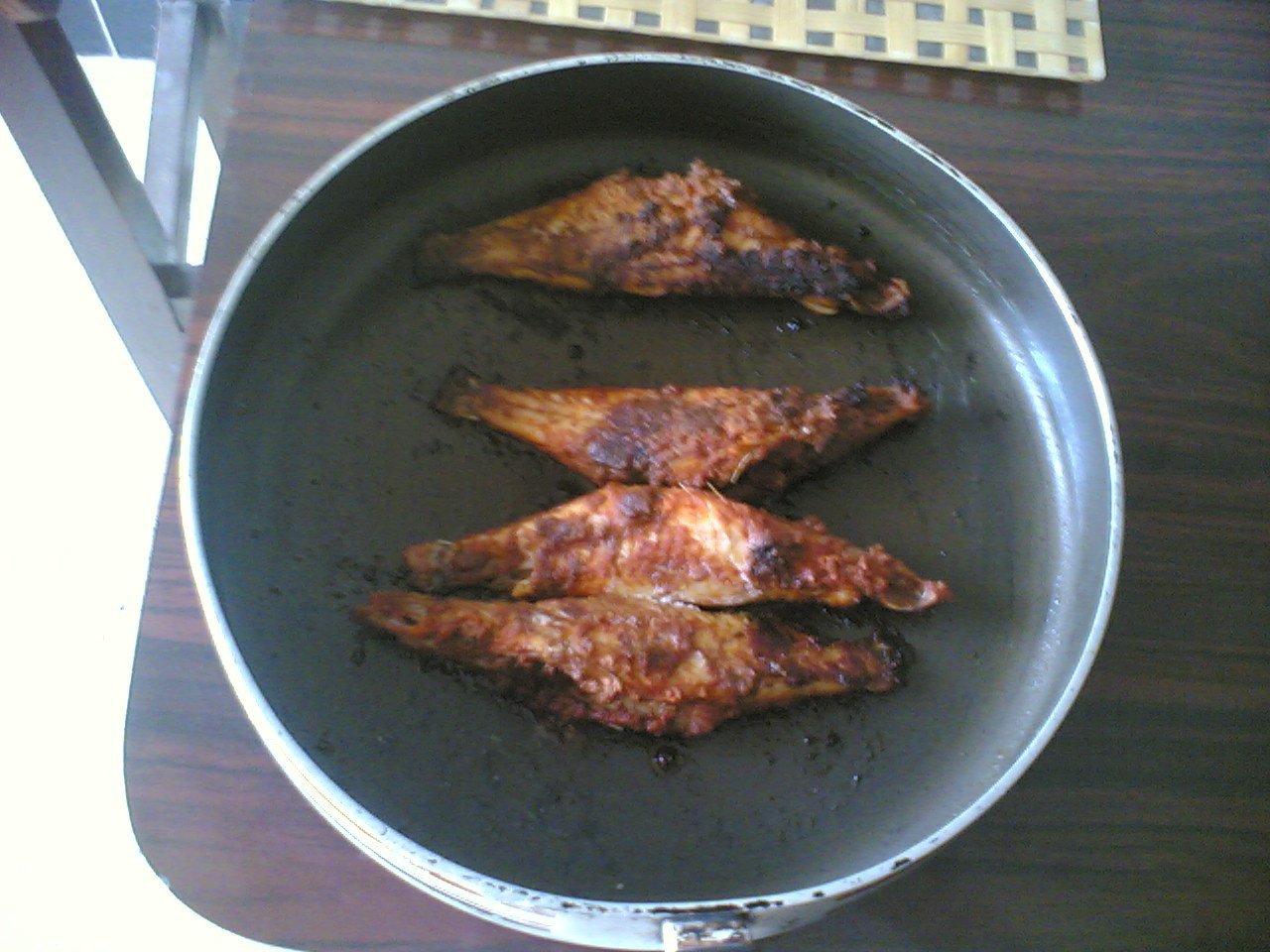 mangalore konkani style pan fried fish.